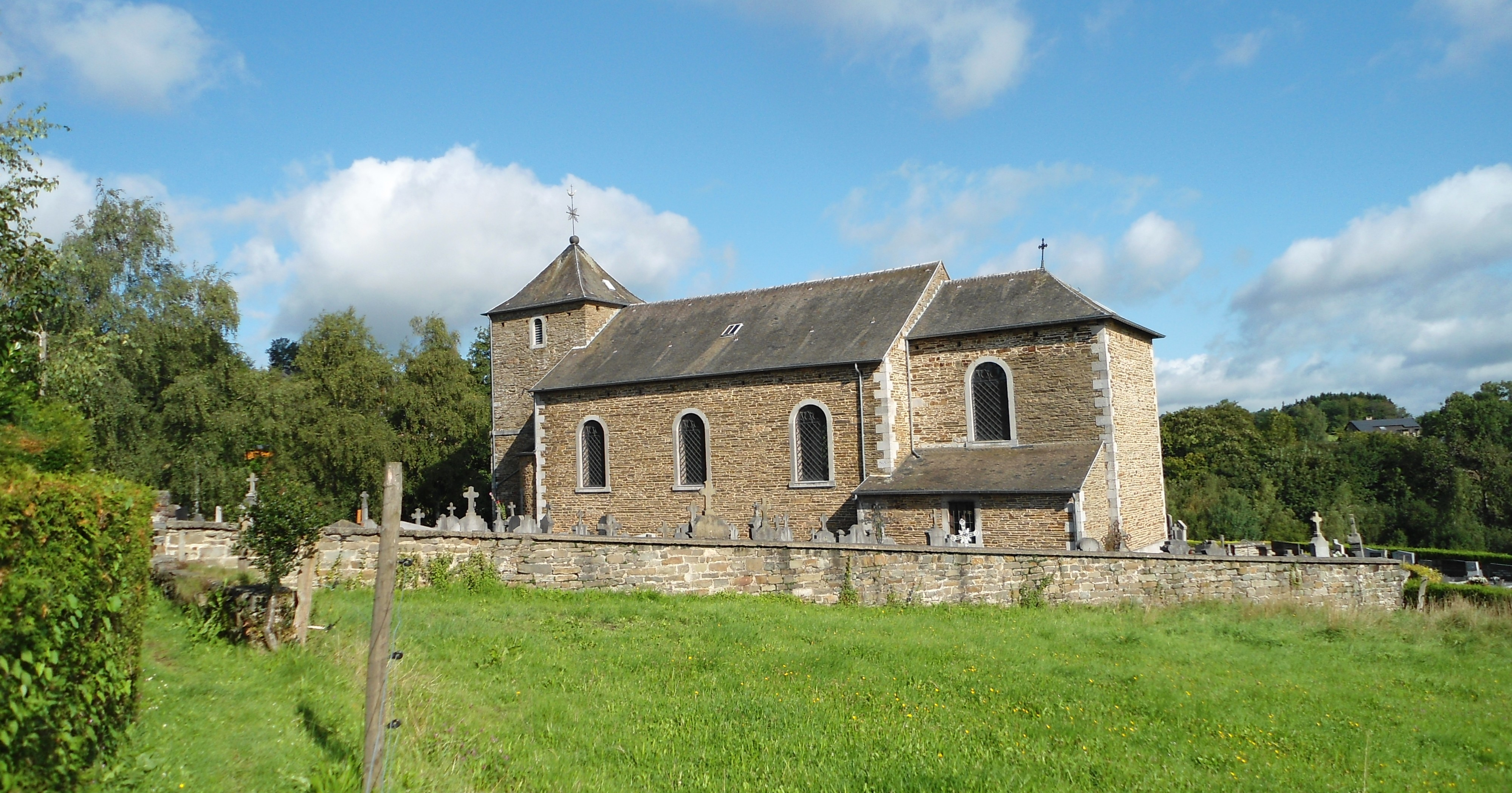 Eglise de Lorcé